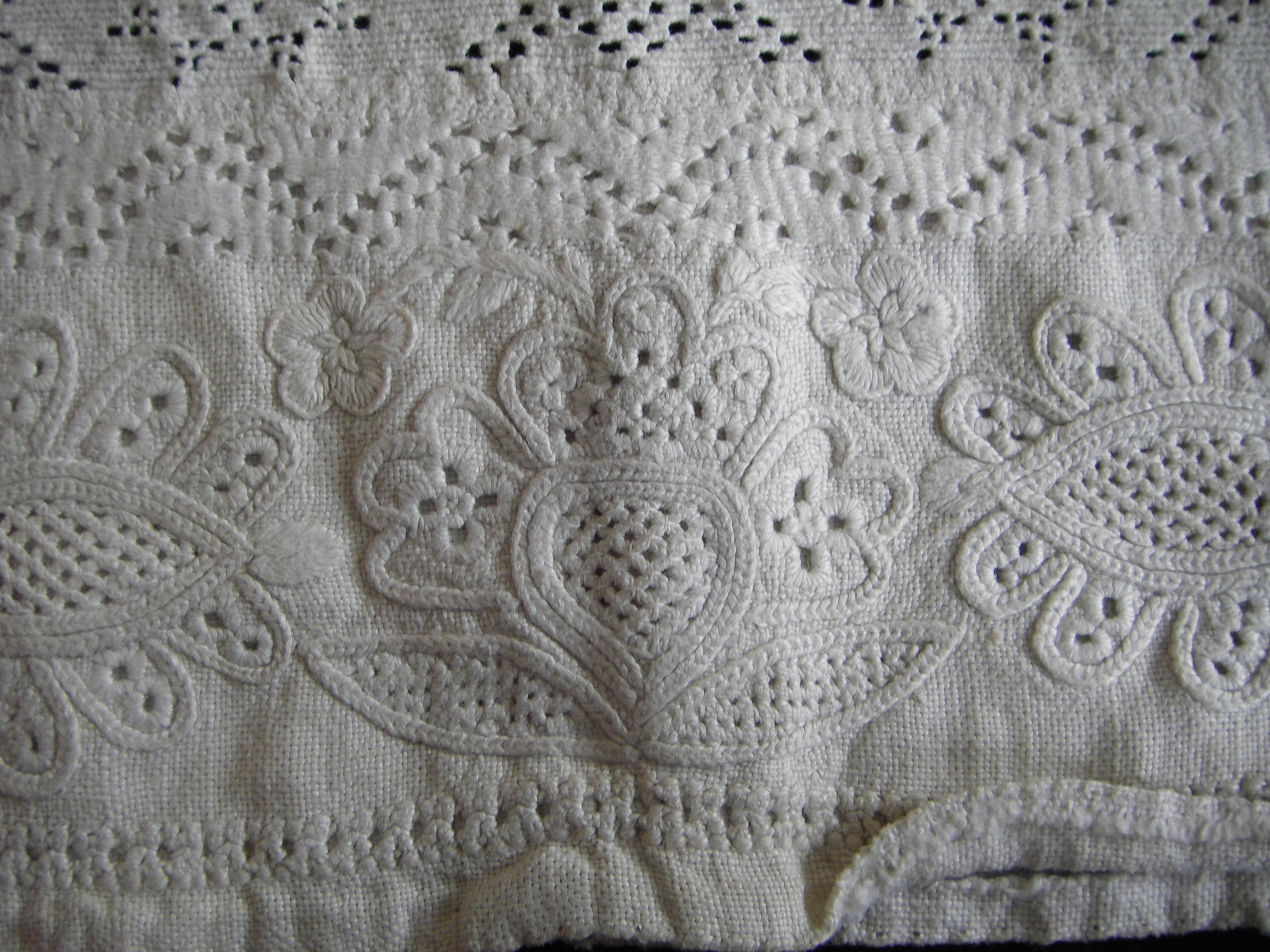 Hedebosyning fra perioden ca. 1820 - 1840